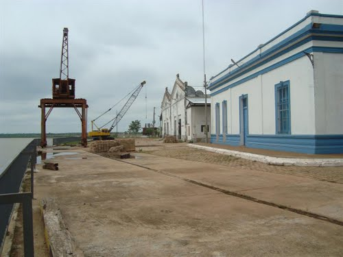 Imagen del historico puerto de la ciudad de Concepción en Paraguay. Dpto. de Concepción.